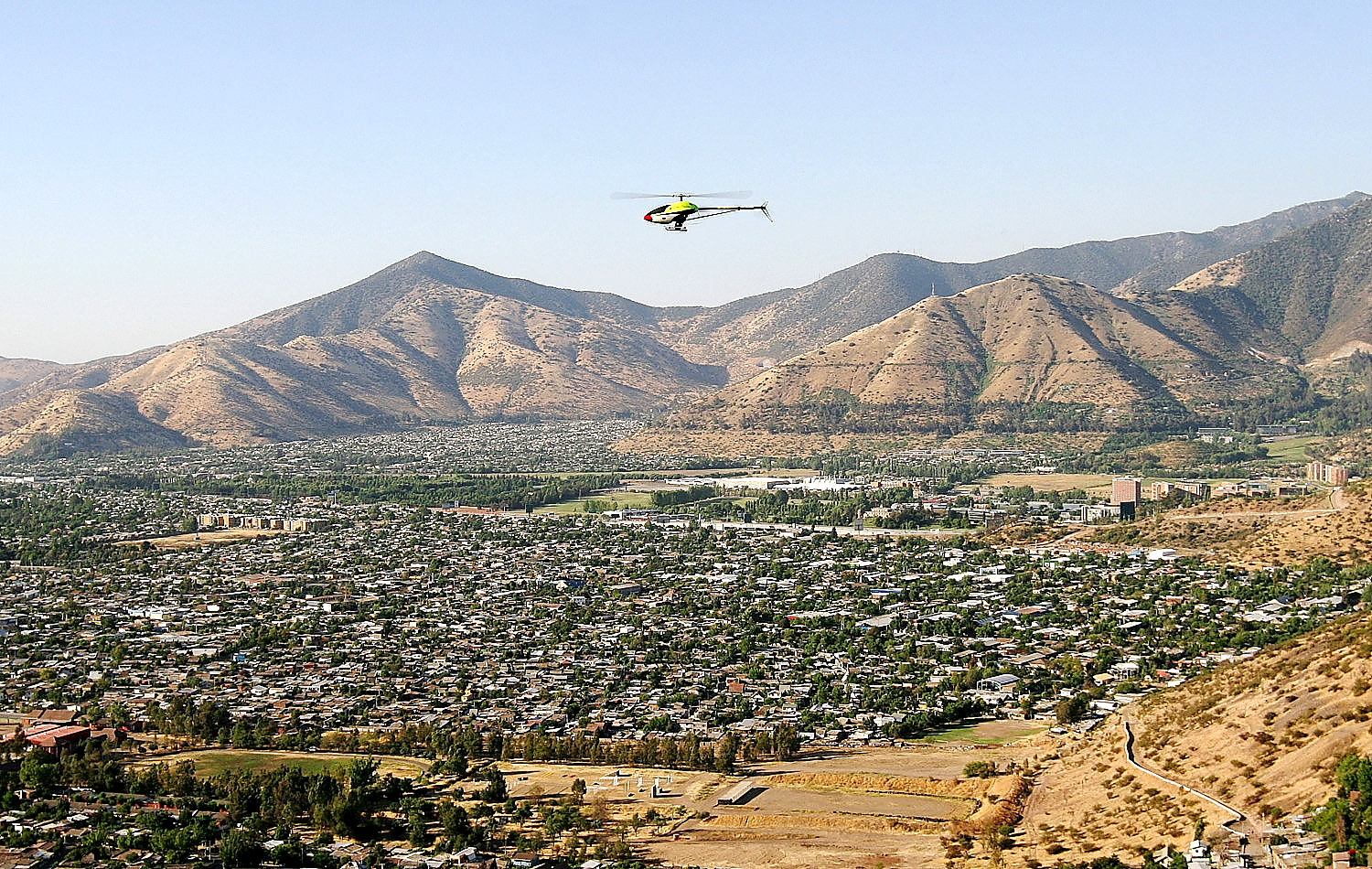 World Scenic Flights in Chile- World Scenic Flights vor dem Panorama von Santiago de Chile